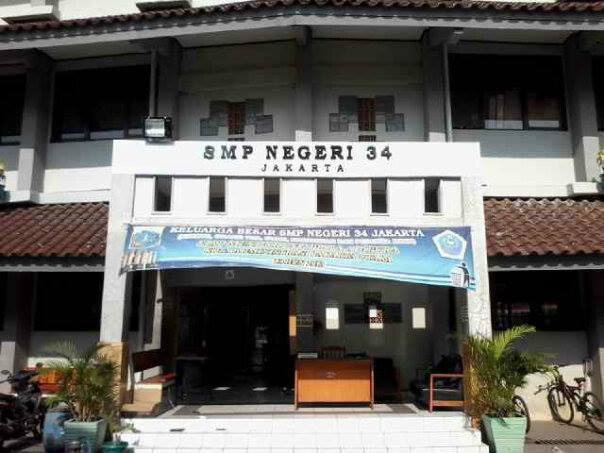 Gerbang SMP Negeri 34 Jakarta